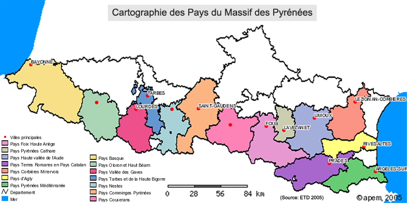 Cartographie des pays du Massif des Pyrénées